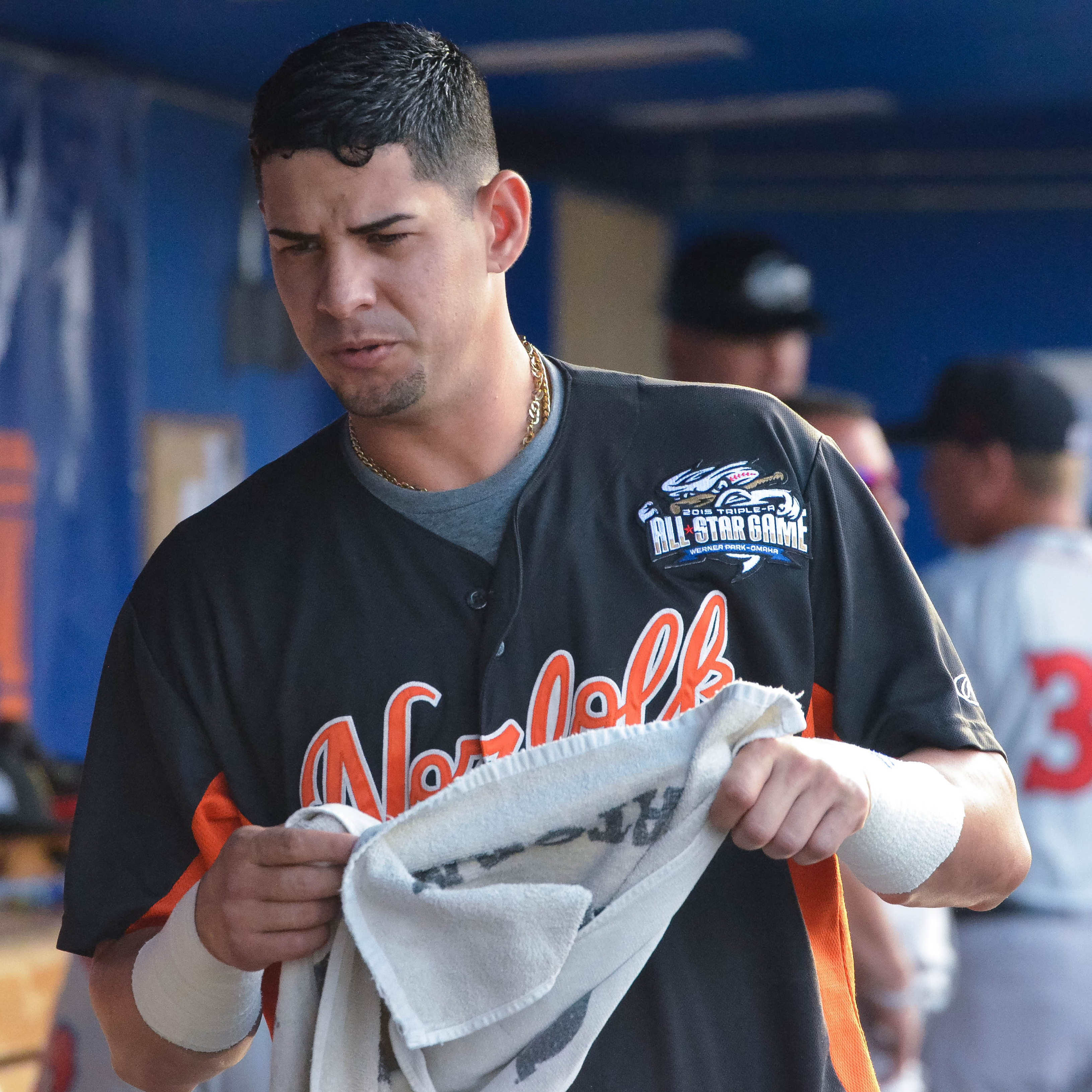 Dariel Álvarez